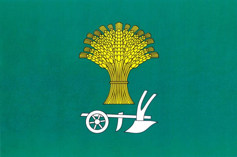 Hodonice, okres Tábor, vlajka